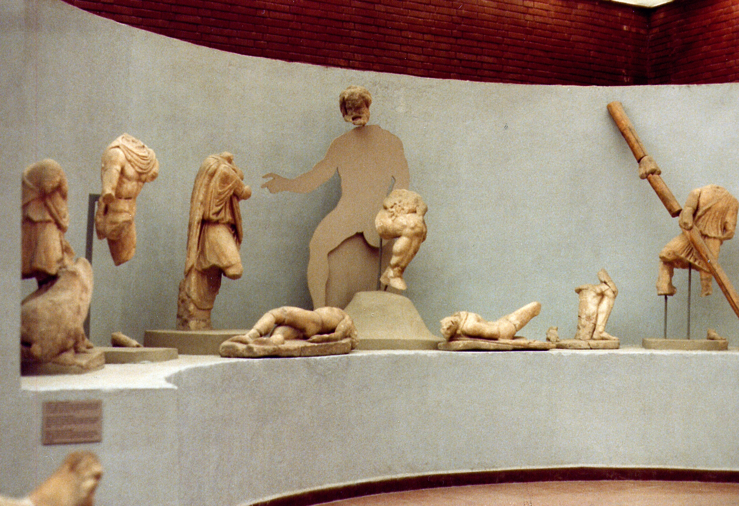 Reste der Polyphem-Gruppe, Fries vom Isis-Tempel in Ephesus, Ephesus-Museum Selçuk, Westtürkei